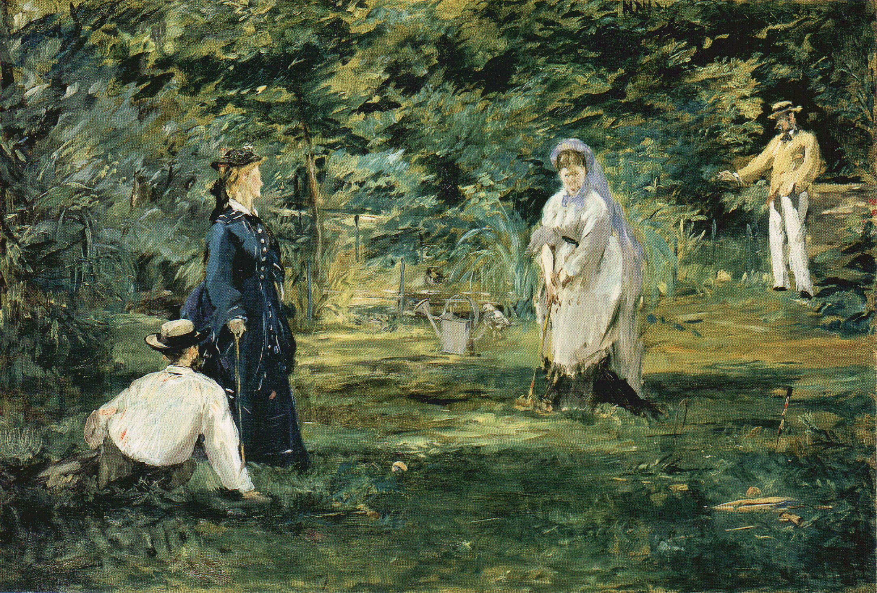 Vier Personen haben sich zum Krocketspiel versammelt: im Vordergrund sitzend der Künstlerkollege Alfred Stevens, im Hintergrund Paul Roudier, ein Freund Manets. Dazwischen sind Alice Lecouvé und Victorine Meurent zu sehen, die den Impressionisten Modell standen. Selten kam Manet der impressionistischen Malweise so nahe wie hier. Die Provokation war geplant: Die vermeintlichen Ehepaare sind die Künstler und ihre Modelle – die bürgerliche Idylle erweist sich als Trugbild.